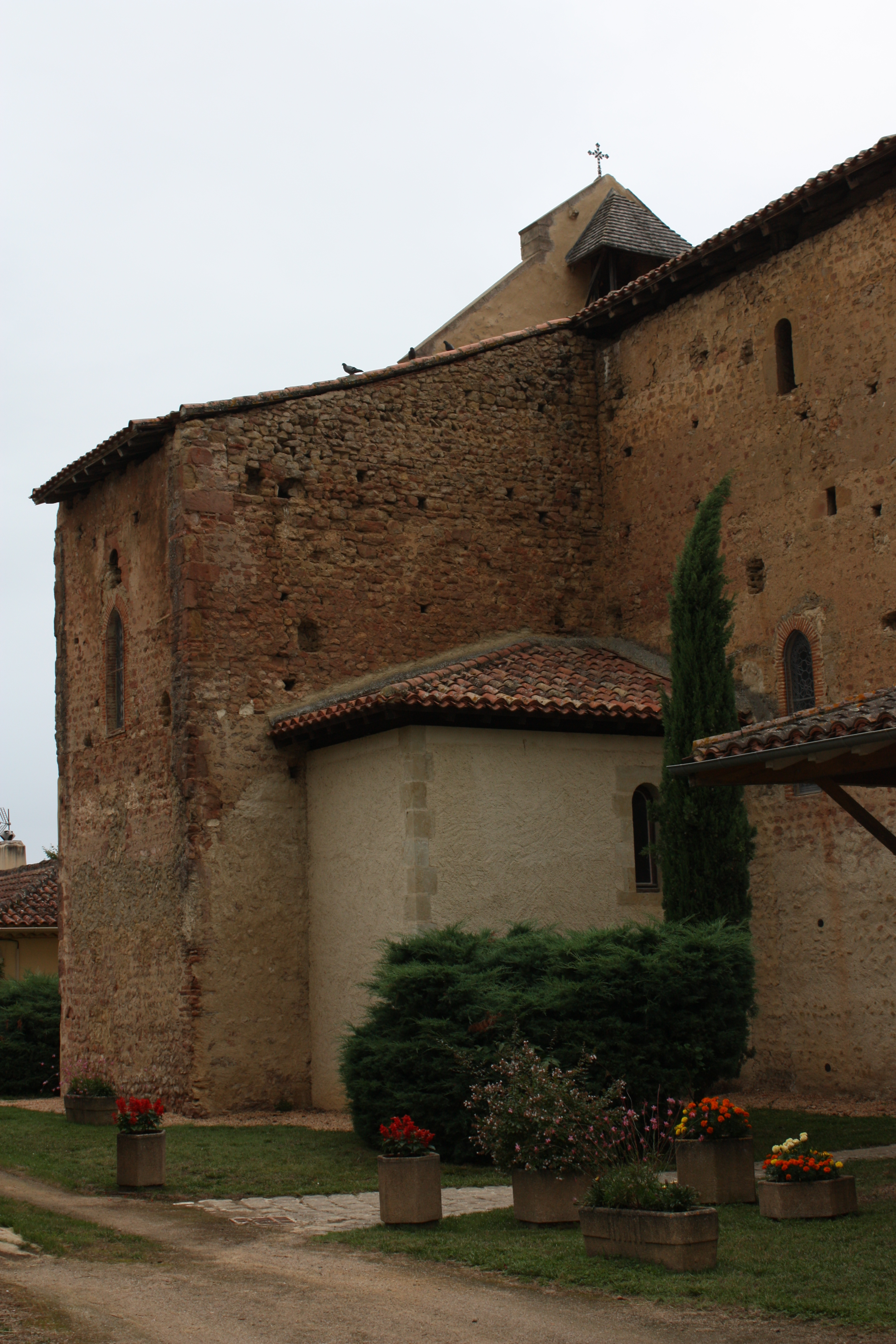 Mouchès - Eglise Saint-Julien Eglise du premier art roman avec petites ouvertures.